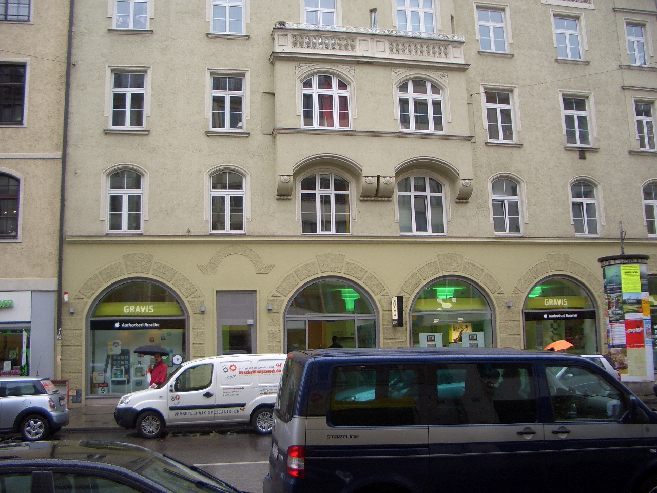 Das Sternecker Bräu heute